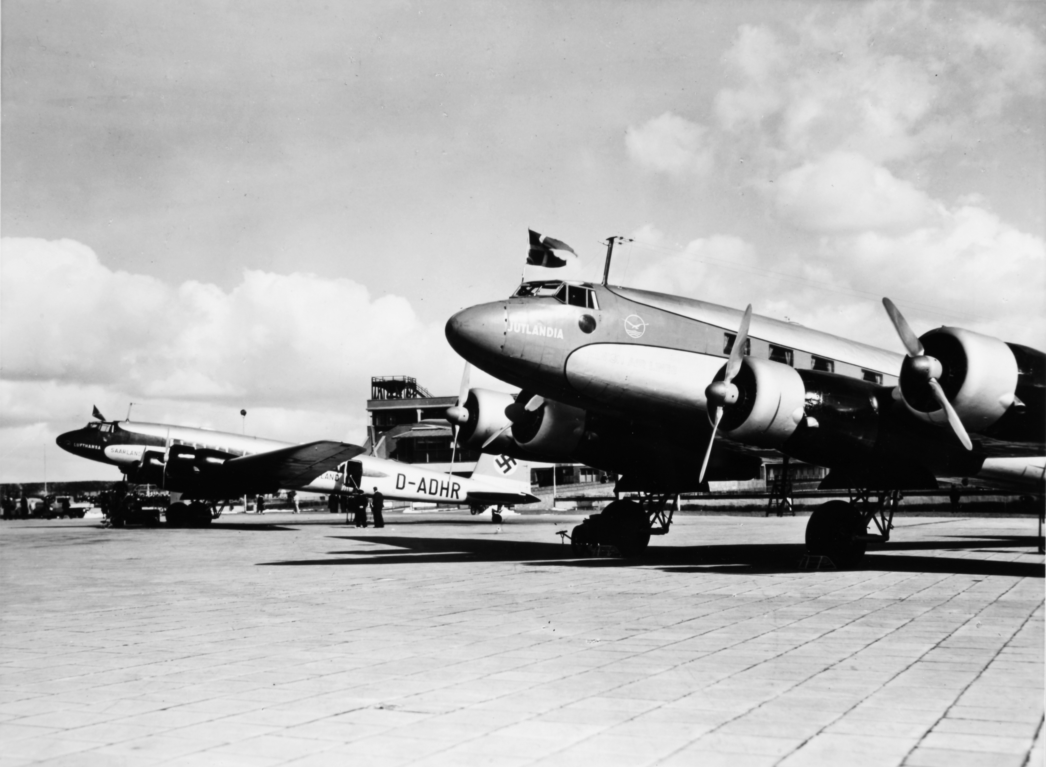 two FW 200 at a (danish?) airport Det Danske Luftfartselskab (DDL) FW 200 "Jutlandia" (OY-DEM) Deutsche Lufthansa (DLH) FW 200 "Saarland" (D-ADHR)